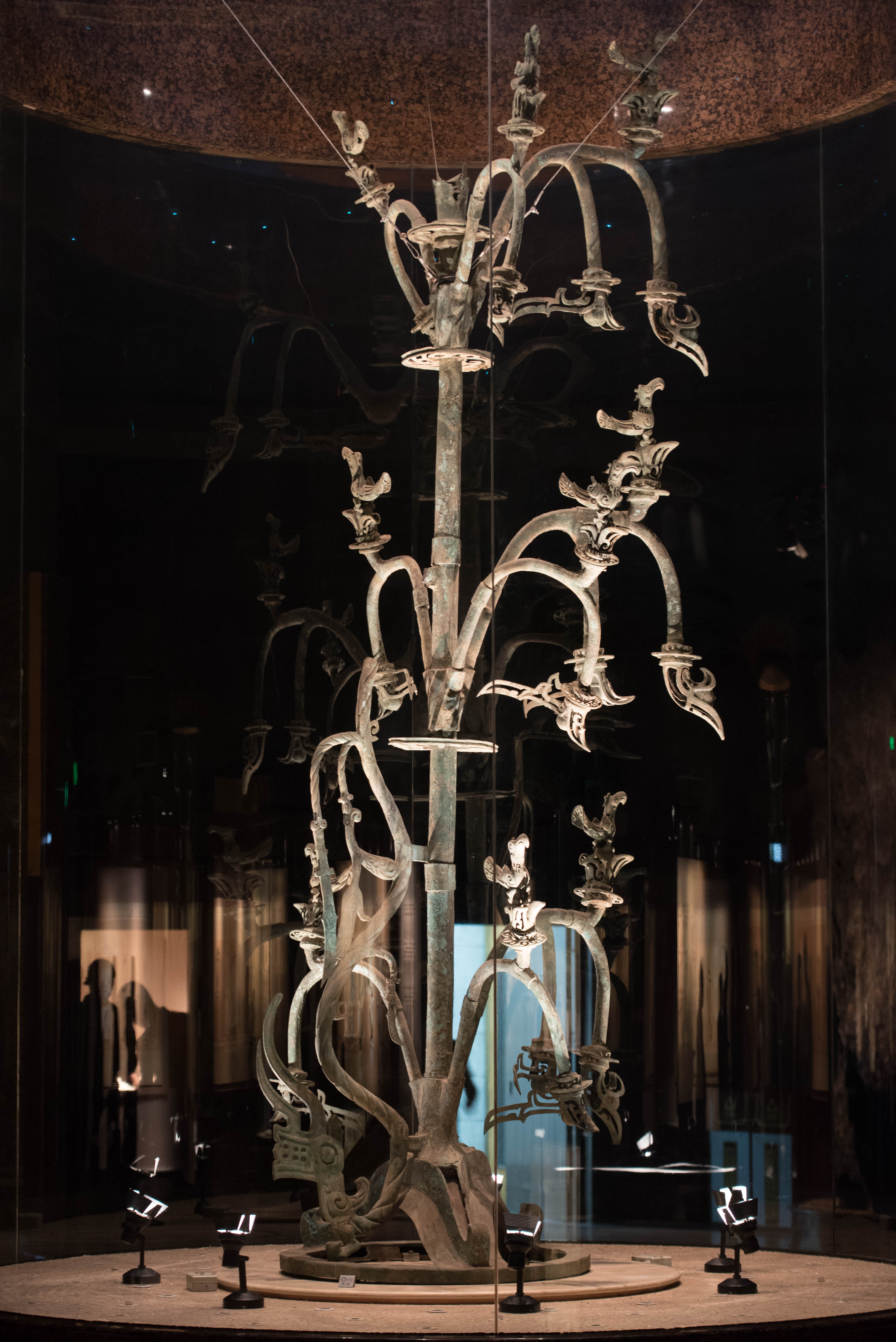 三星堆出土青铜神树